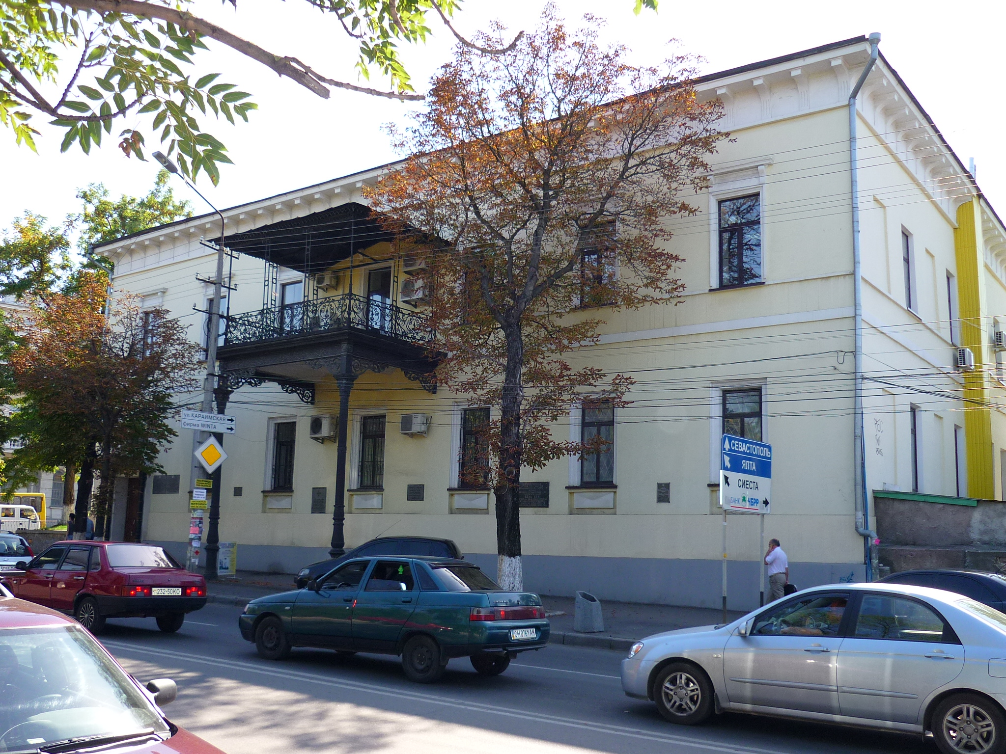 Колишній будинок губернатора Таврійської губернії, 1835 р. (будівля, в якому в 1920–1921 рр.. перебував ревком Криму)